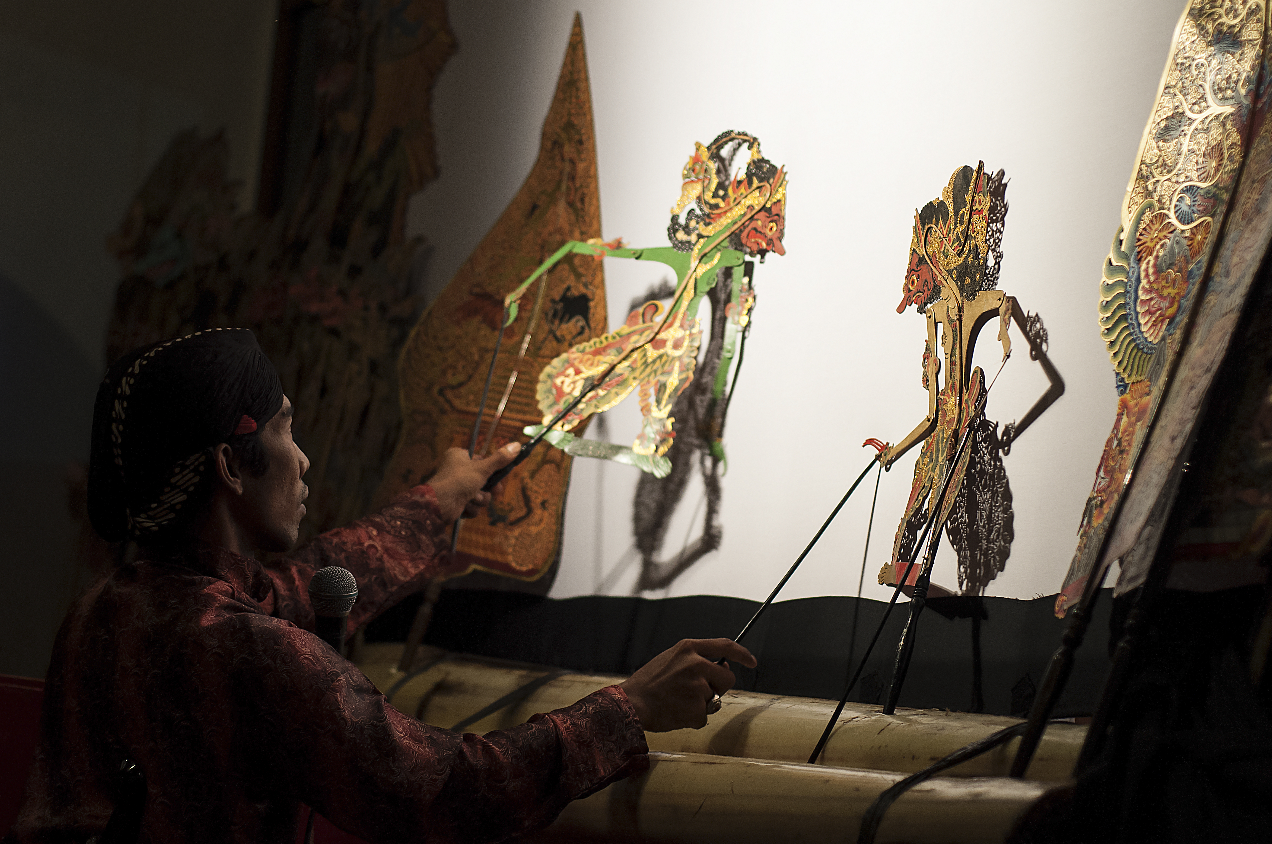 Dalang dalam dunia pewayangan diartikan sebagai seseorang yang mempunyai keahlian khusus memainkan boneka wayang (ndalang).